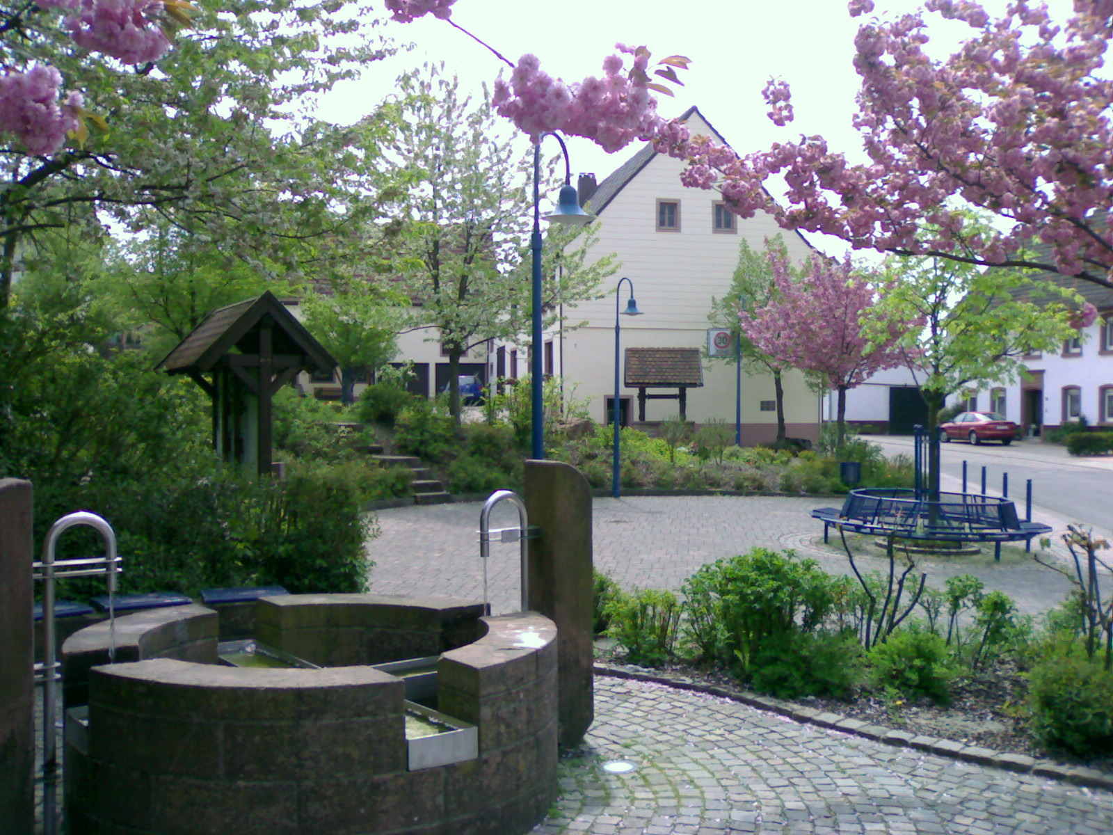 Selbst erstelltes Bild Hermersberg (ehemaliger Dorfbrunnen)